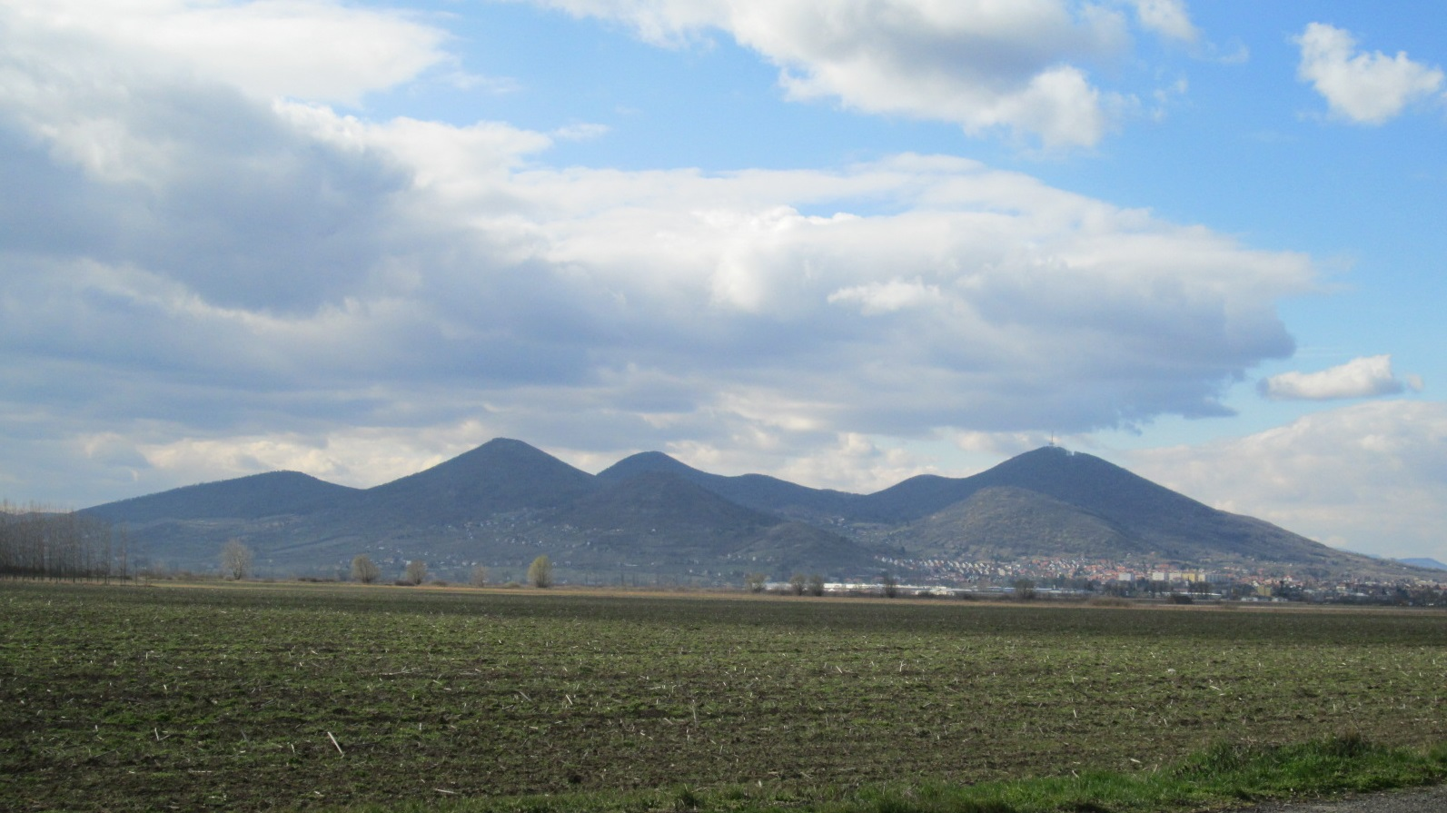 Sátoraljaújhely látképe a Bodrogköz felől, a "sátorhegyekkel"